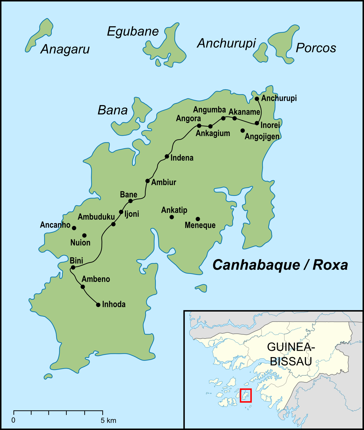 Karte der Insel Canhabaque, auch Roxa genannt. Sie liegt im Osten des Bissagos-Archipels, der zu Guinea-Bissau gehört.